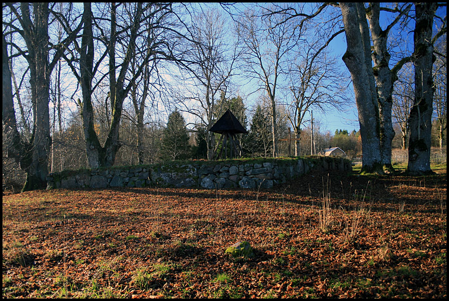 Bergstena Kyrkoruin